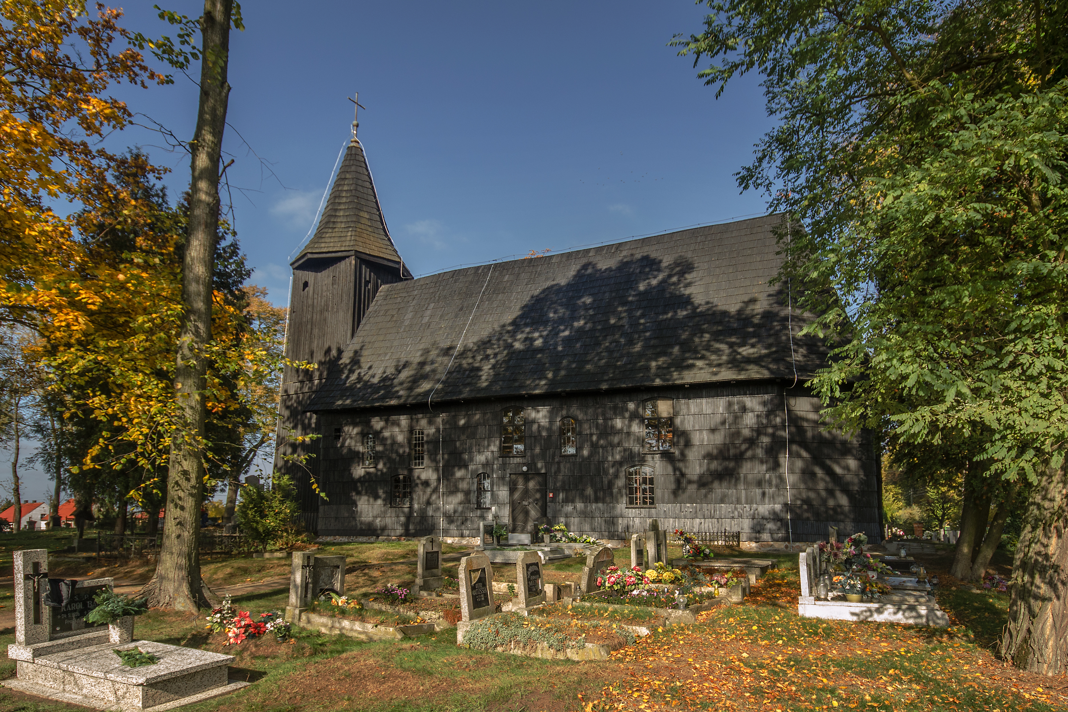 Gierałcice, kościół ewangelicki, XVII